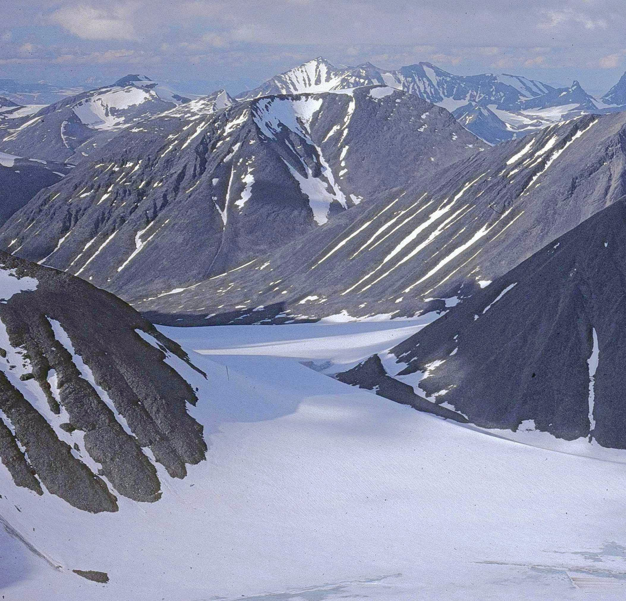 Vy från Ritatjåkko, Sarektjåkko i bakgrunden